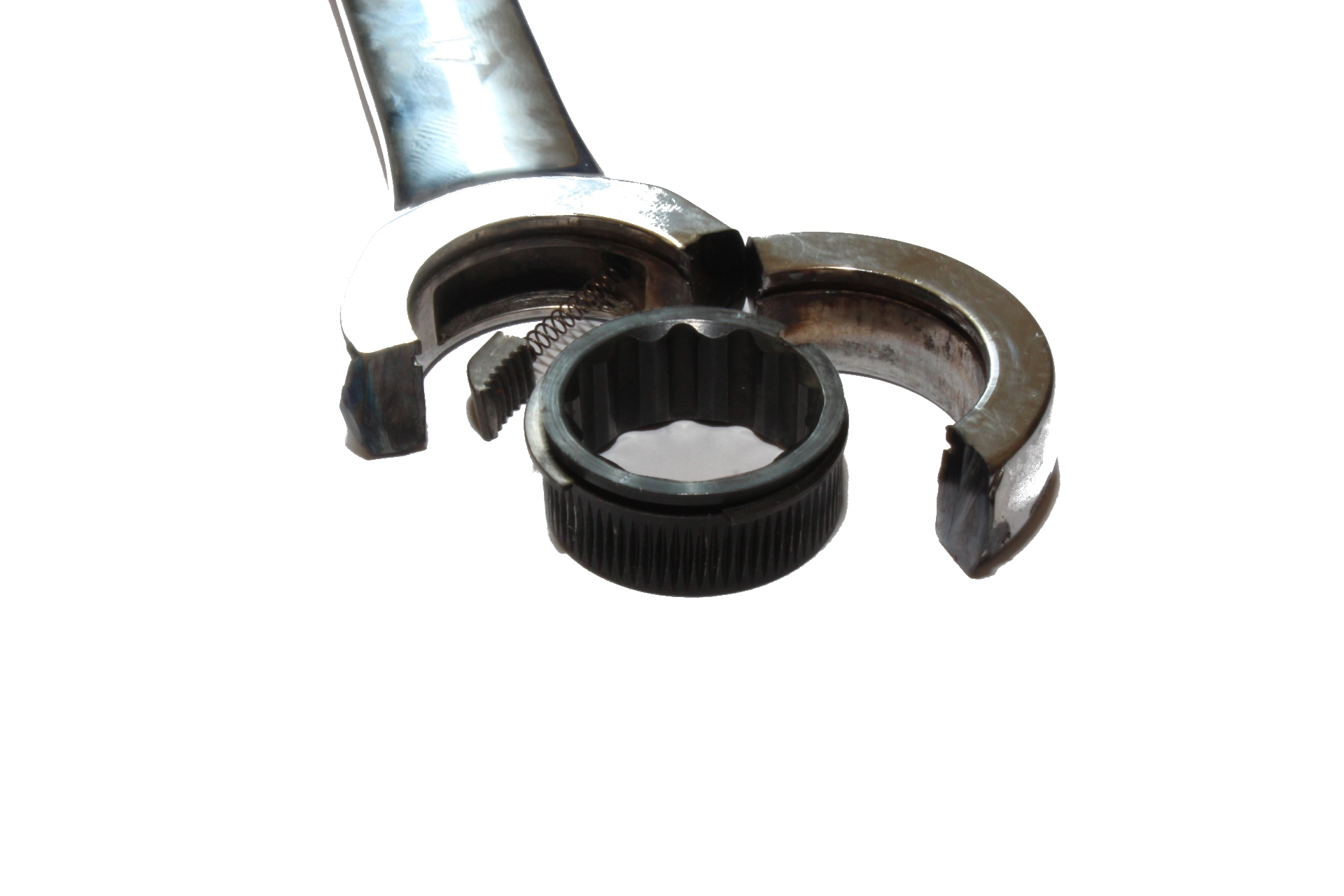 Gabelschlüssel mit Ratsche - aufgeschnitten. Mit Klemmkeil und Federring zur Befestigung.